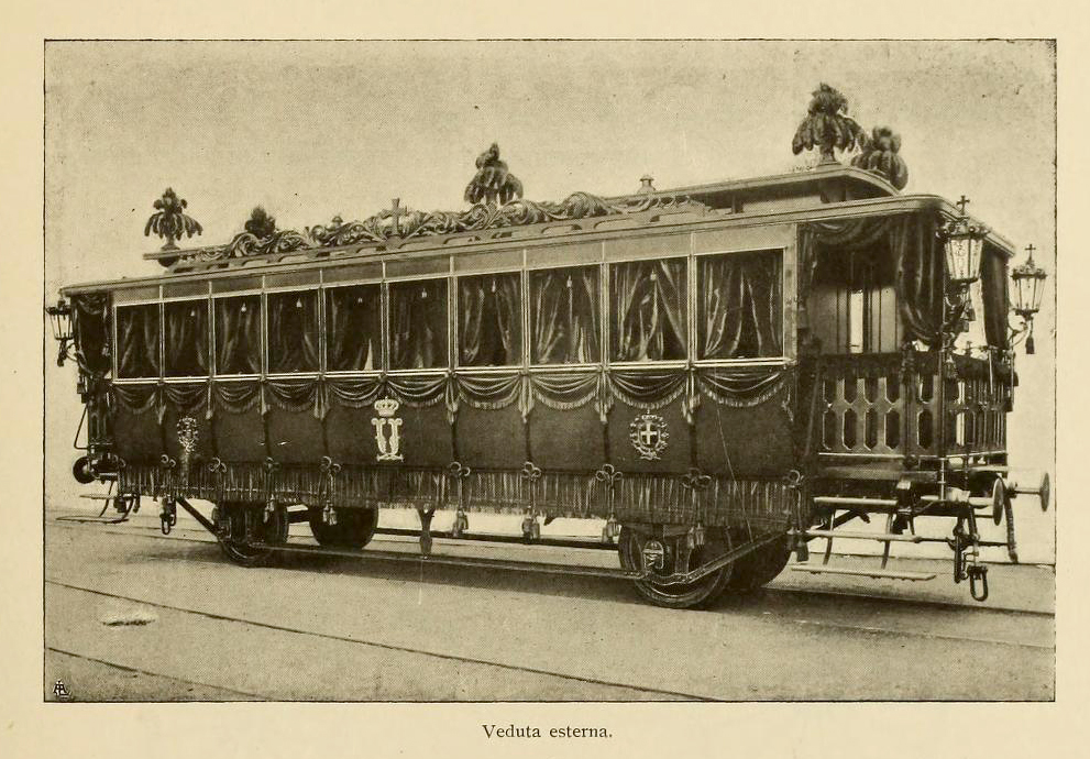 Vagone funebre di Umberto I, esterno, utilizzato per il trasporto della salma del Re da Monza a Roma, agosto dell'anno 1900. Il vagone fu costruito nelle officine Miani, Silvestri, Grondona, Comi e C. di Milano